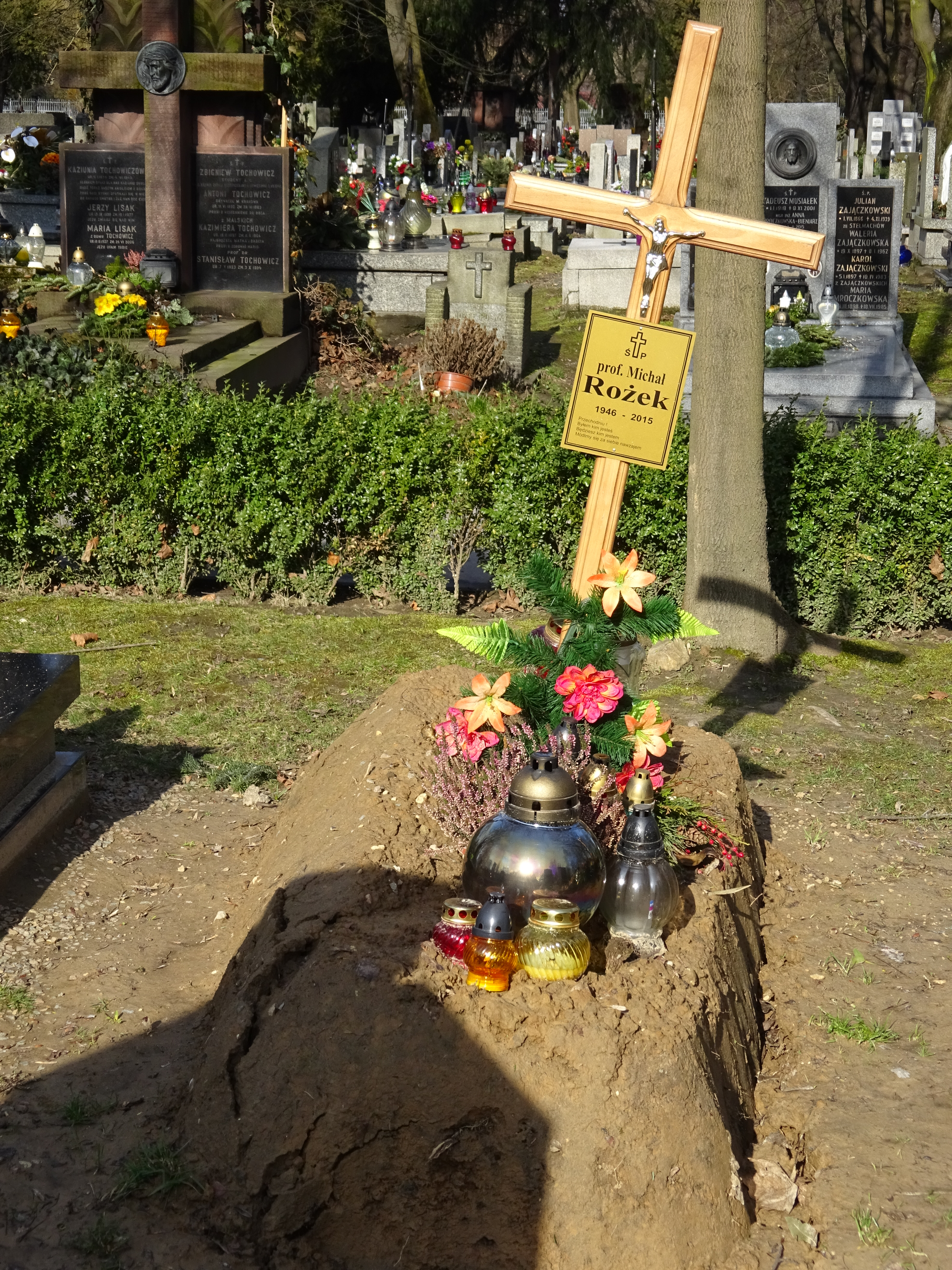 Grób Michała Rożka na Alei Zasłużonych Cmentarza Rakowickiego w Krakowie.